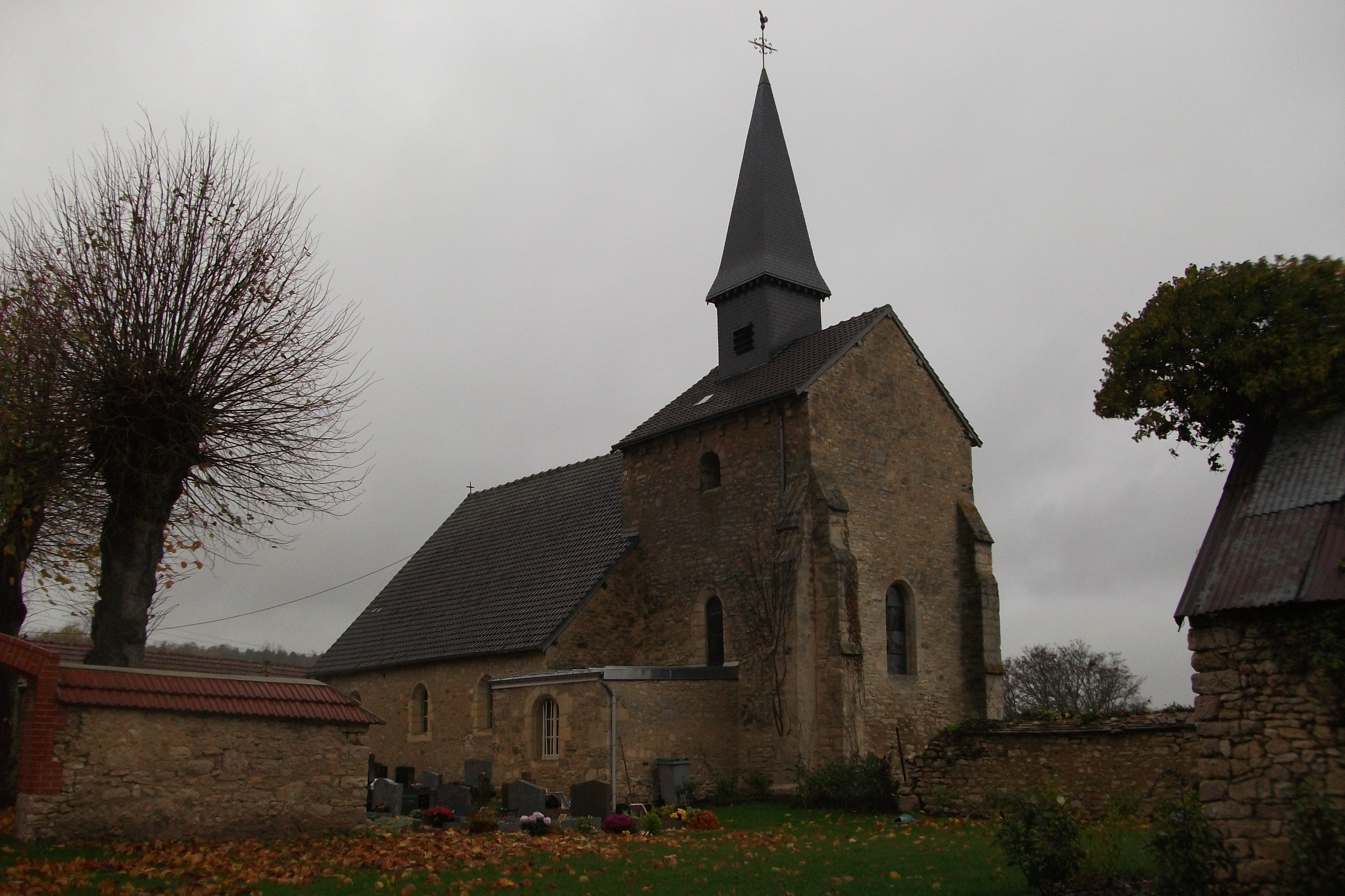 église d'Hourges.